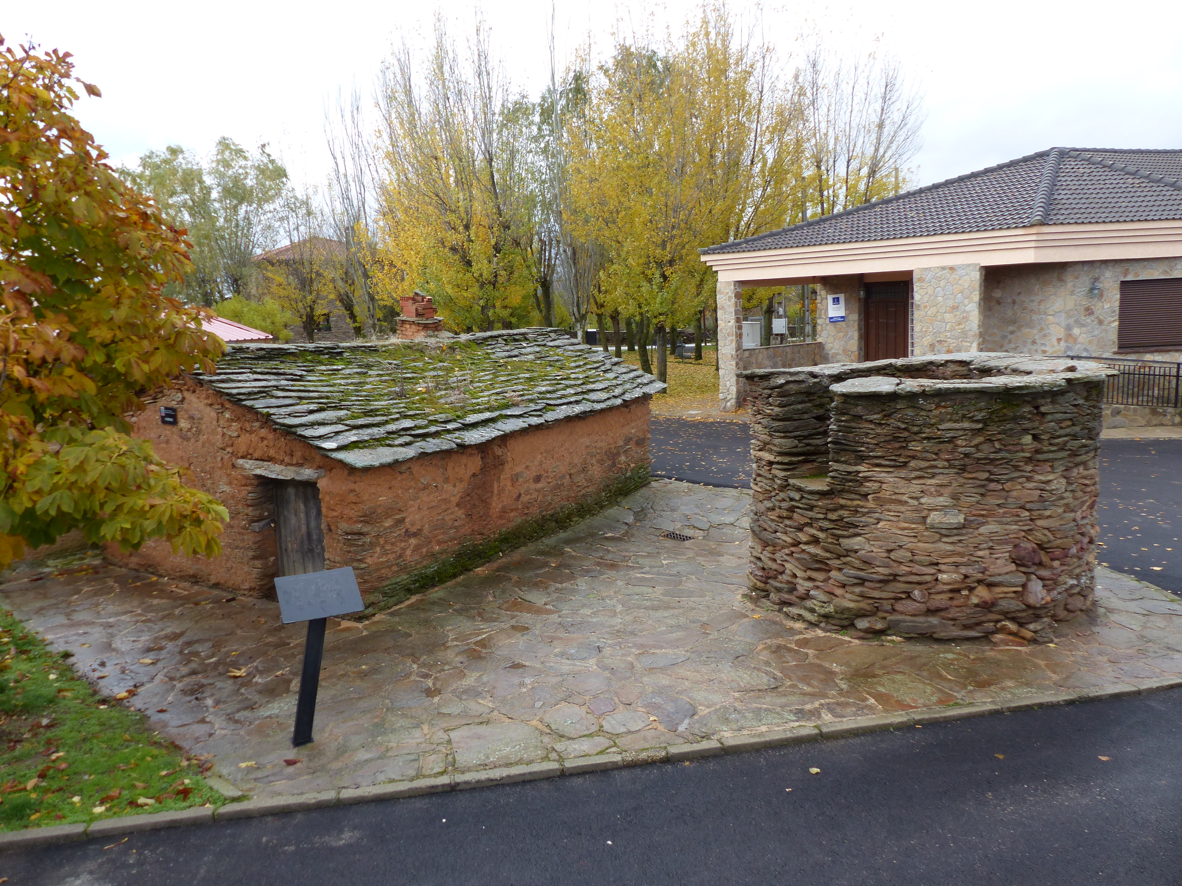 Horno alfarero, Zarzuela de Jadraque